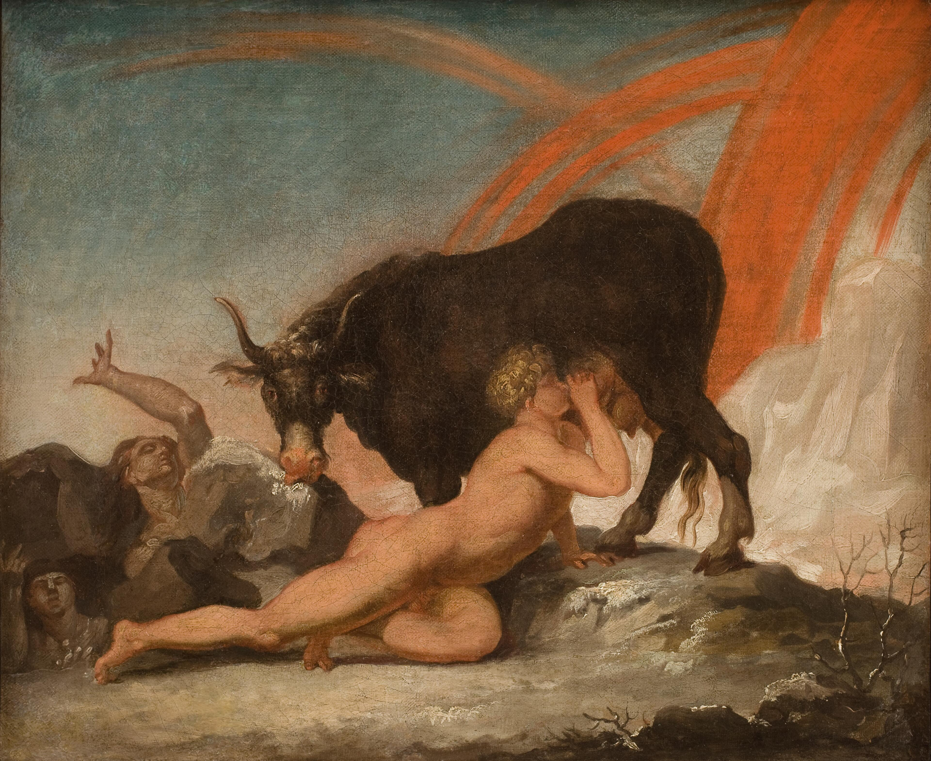 Auðumbla